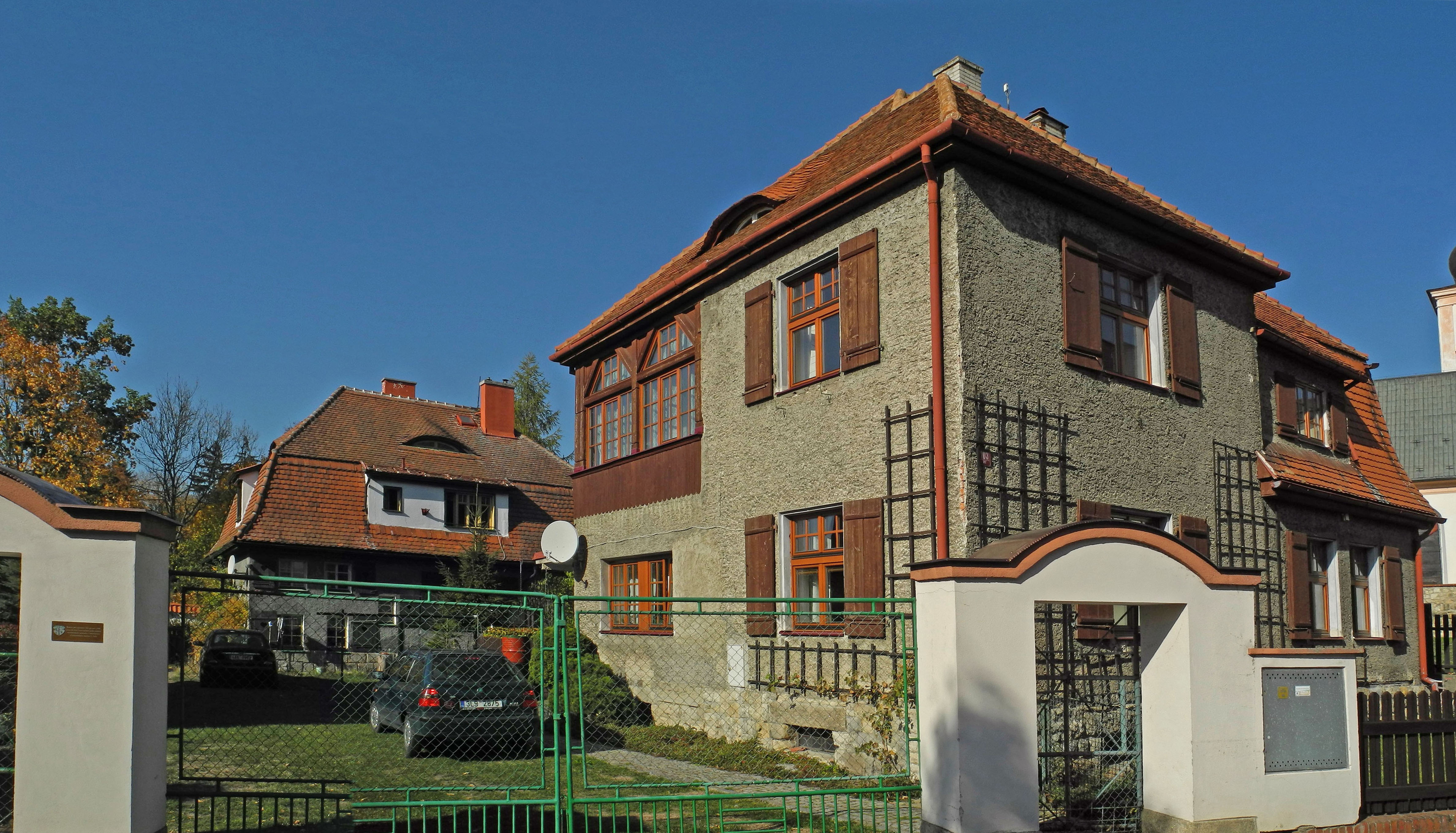 Fünf Villen im alten Schlossbezirk von Böhmisch Aicha (Český Dub), errichtet 1909 für die Mitarbeiter der Firma Schmitt nach einem Projekt des Nürnberger Architekten Jakob Schmeißner, Starý zámek 101 bis 103